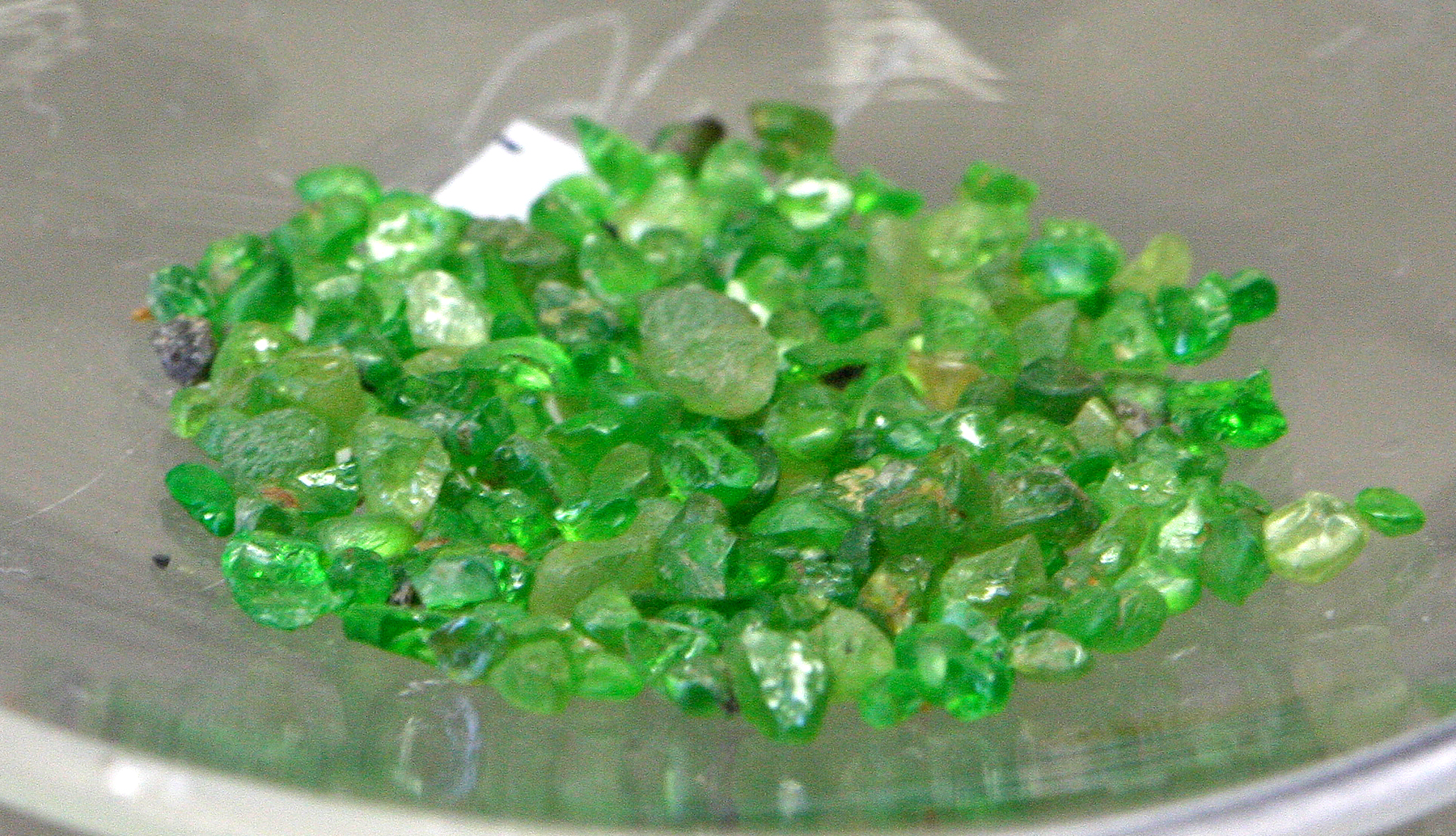 Demantoid, Bobrowa-Fluss/Ural, Mineralogisches Museum Bonn